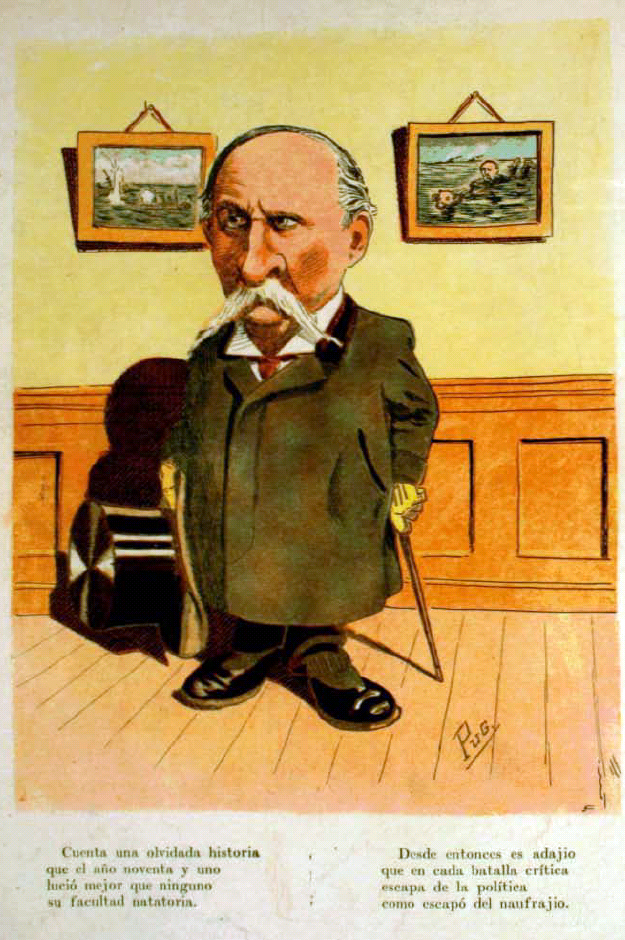 caricatura de Ramón Barros Luco (* Santiago, Chile, 9 de junio de 1835 – † ibídem, 20 de septiembre de 1919) fue presidente de Chile entre 1910 y 1915.